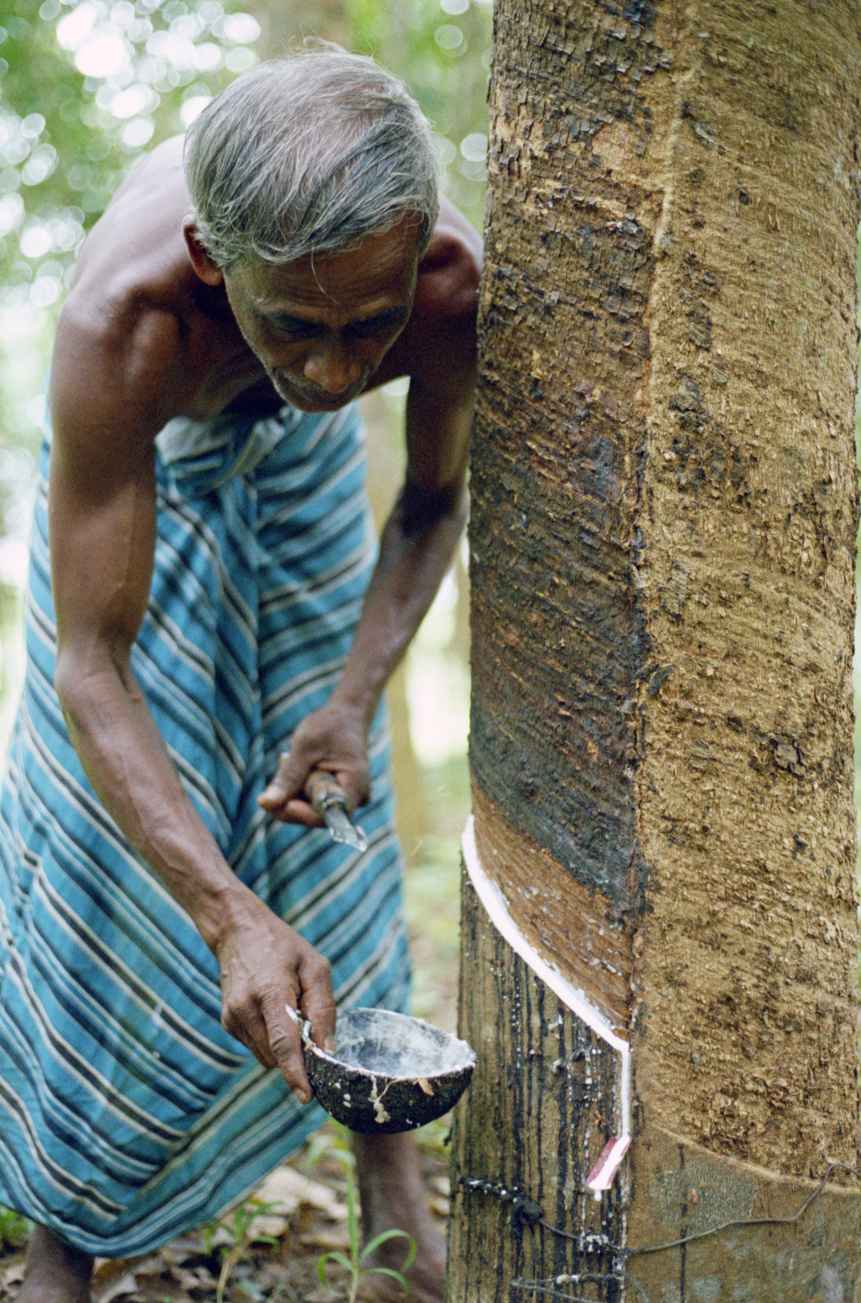 Rubber Farmer in Sri Lanka